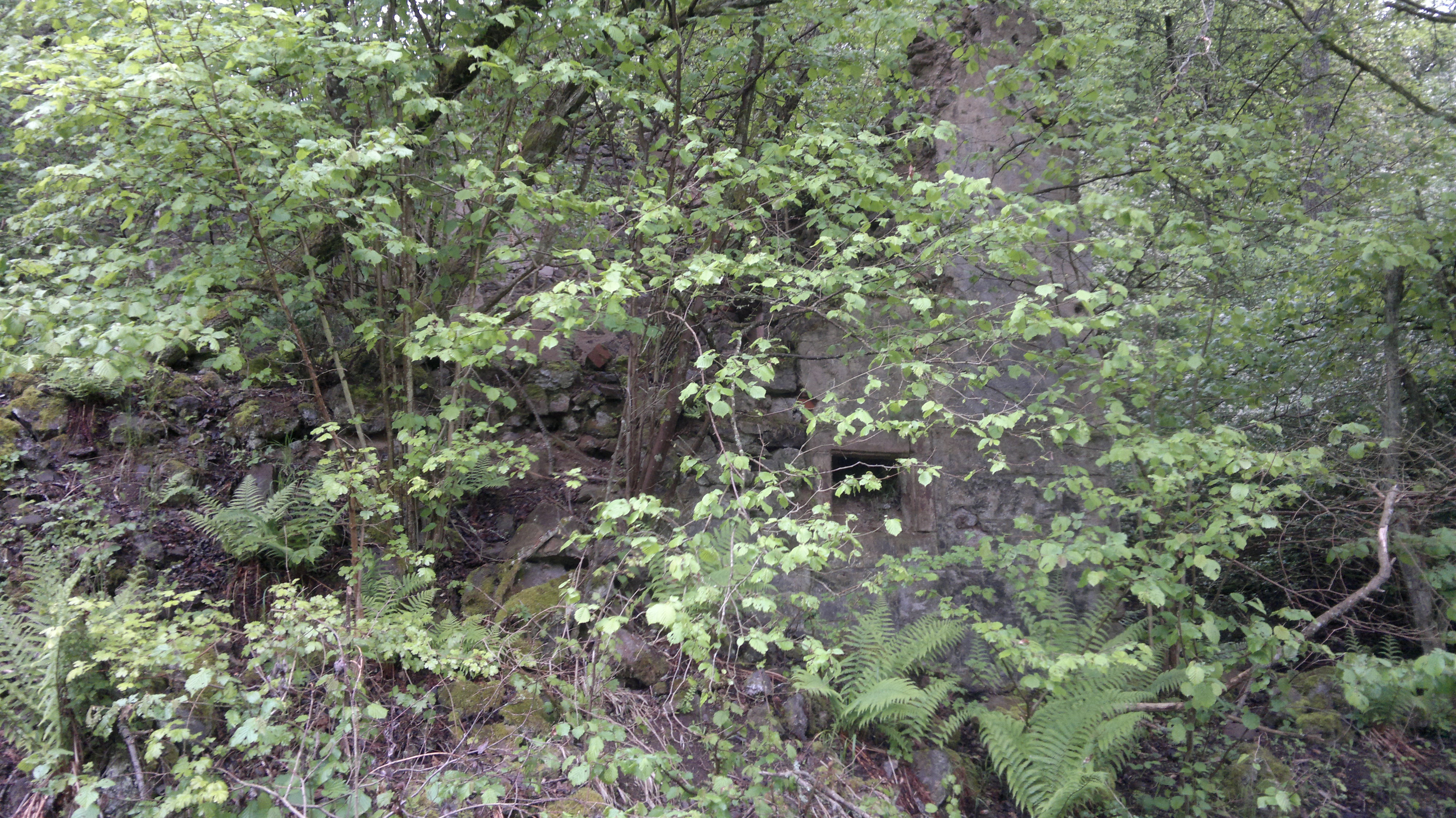 Hausruine im ehemaligen Ort Grünbach auf dem Truppenübungsplatz Baumholder; Wüstung